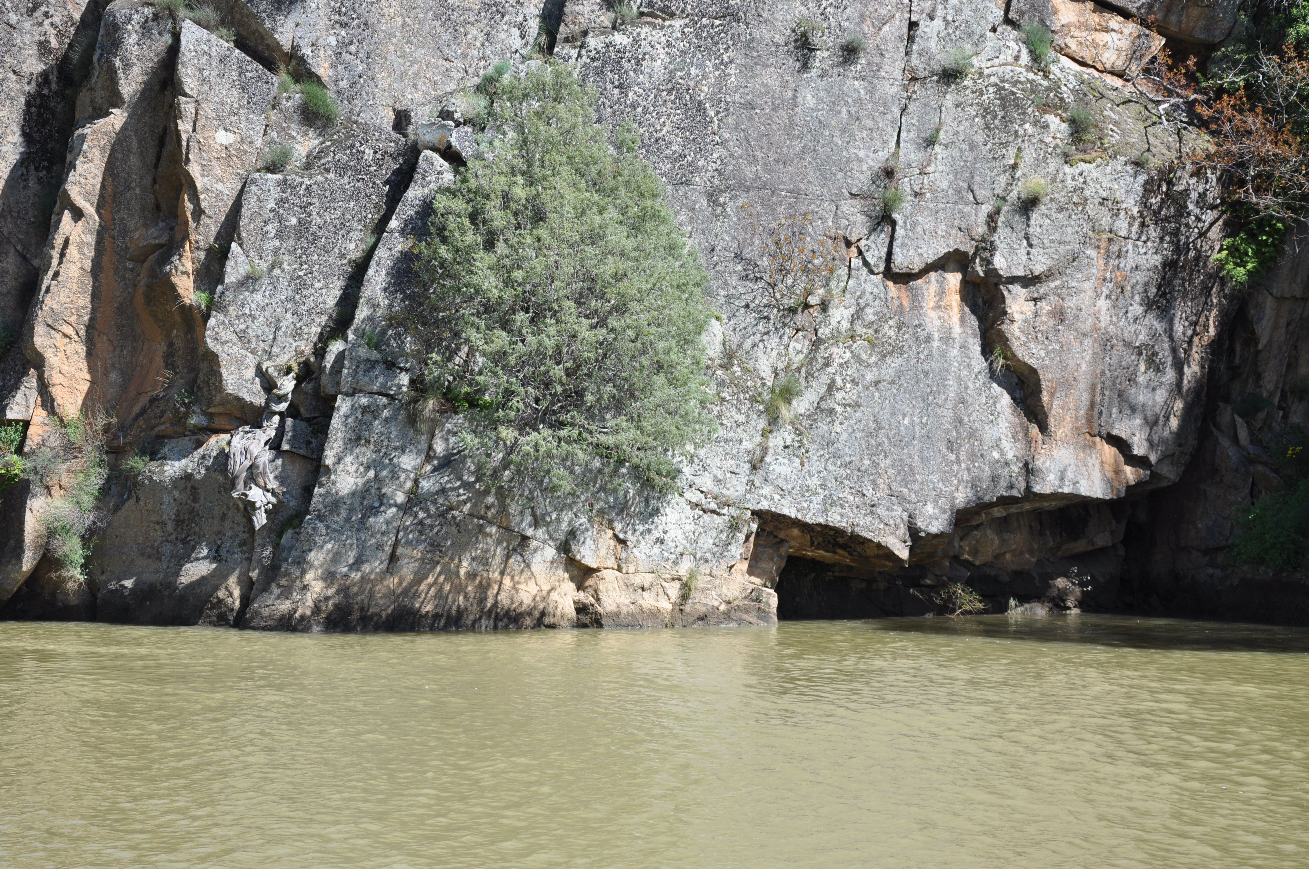 Un enebro, nebro, niebro, o jimbro en las arribas del Duero, vertiente española, Presa de Miranda de l Douro, Portugal.